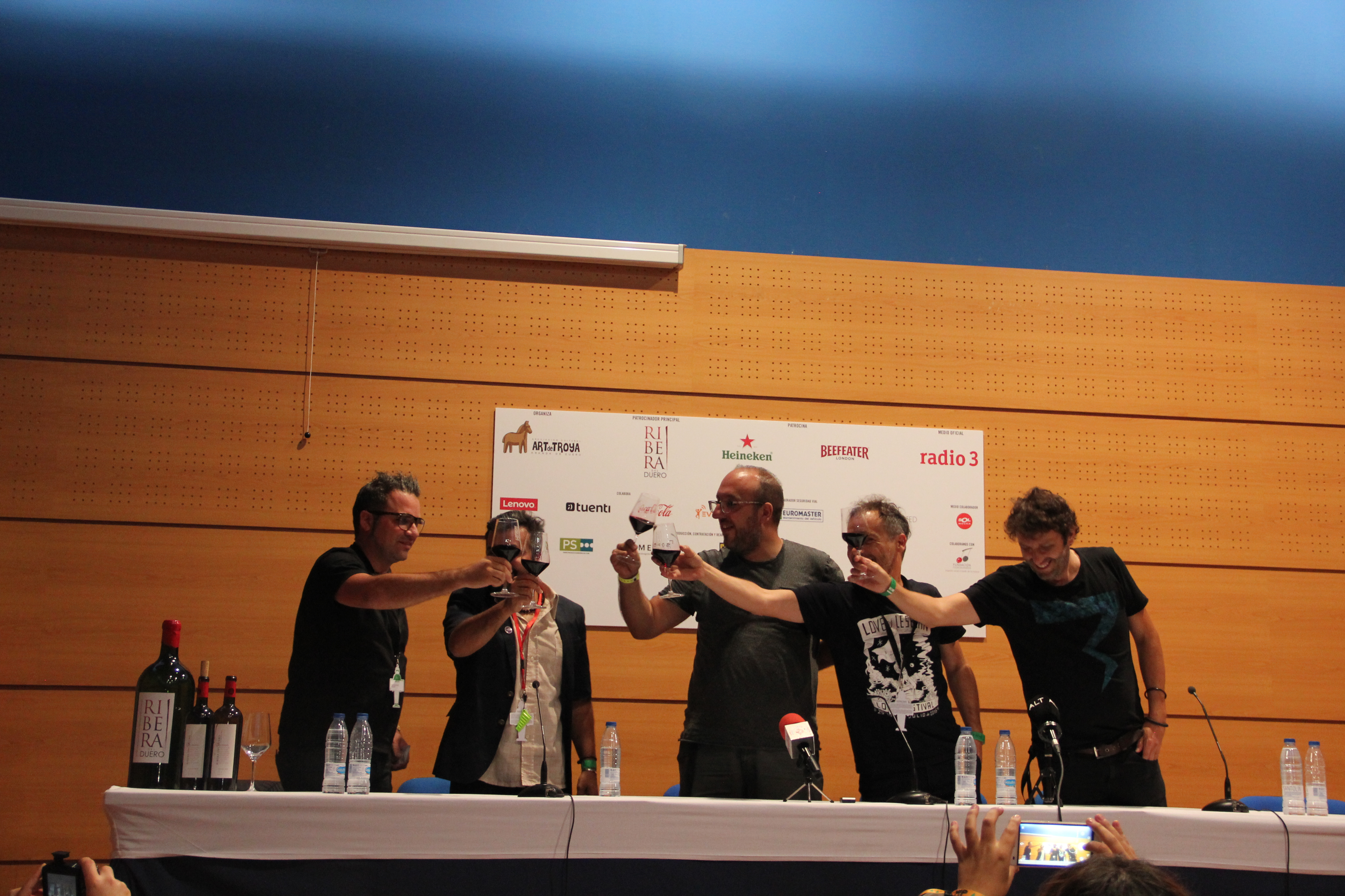 Rueda de prensa de Love of Lesbian durante el Festival Sonorama 2016, en Aranda de Duero (Burgos) España.